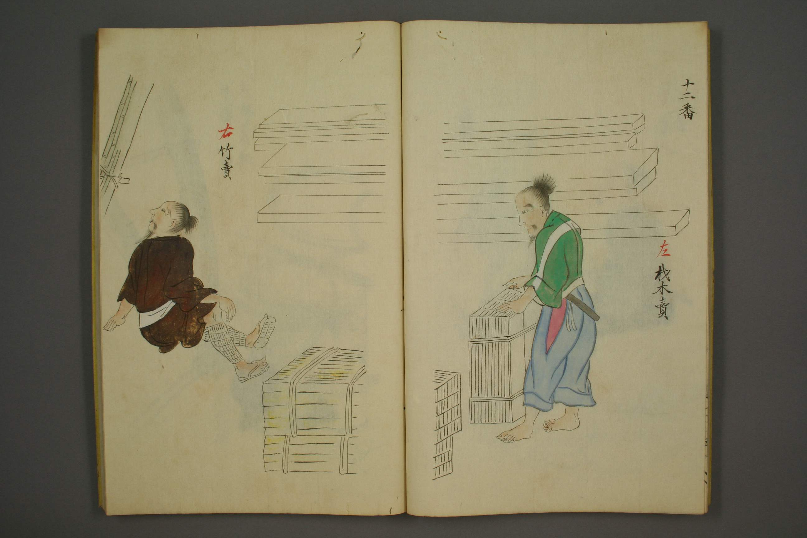 三十二番職人歌合』、垂恵 (?)、1494年、その1838年模写